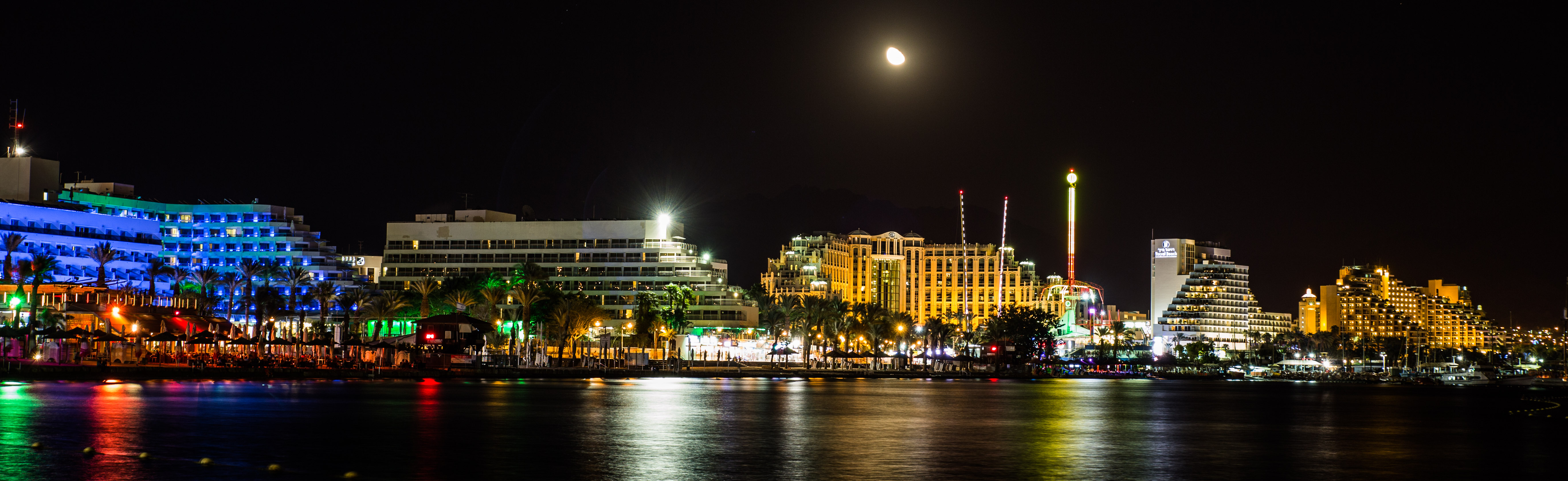 קו החוף של אילת בלילה